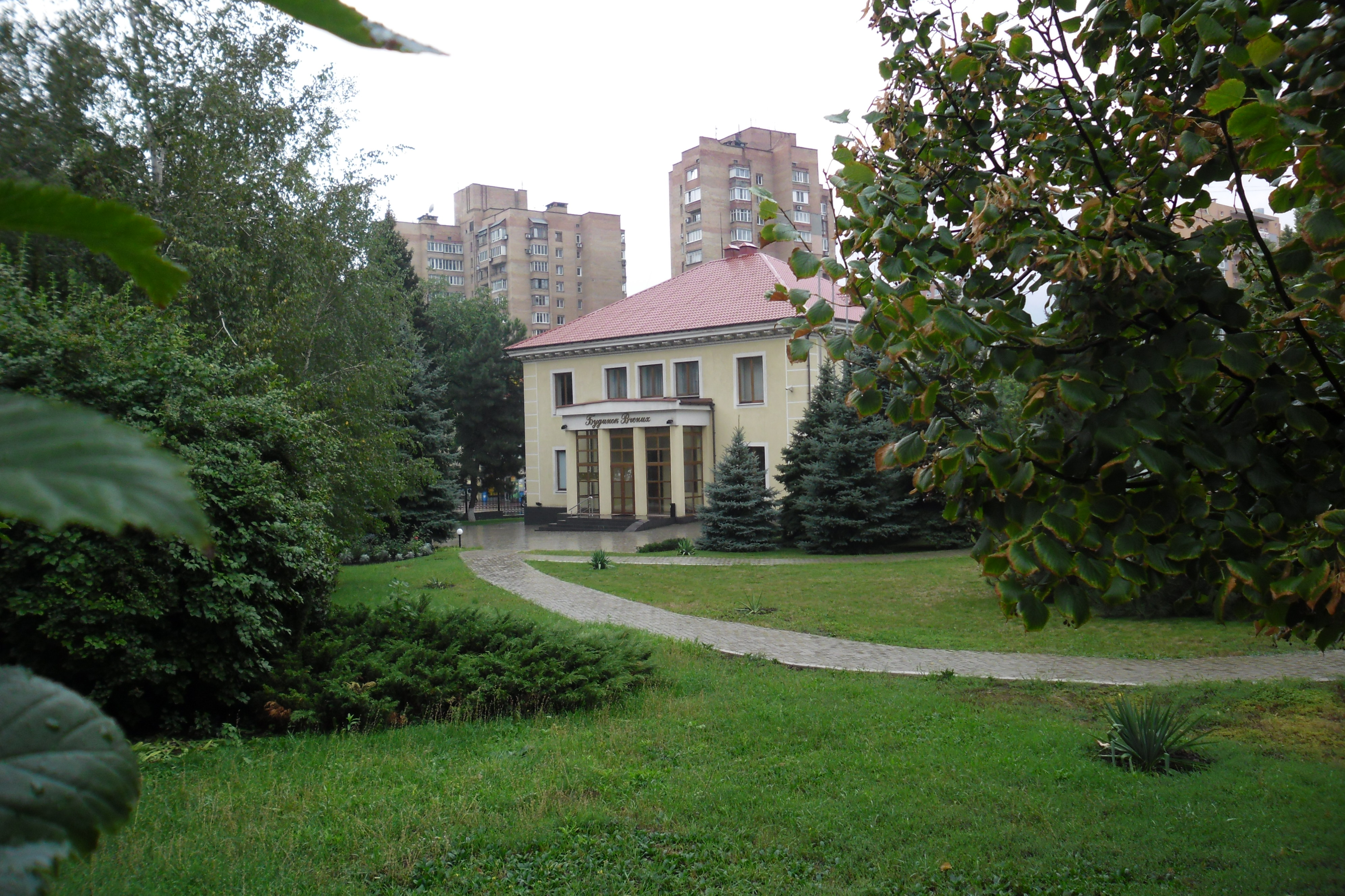 Донецький Центр НАНУ